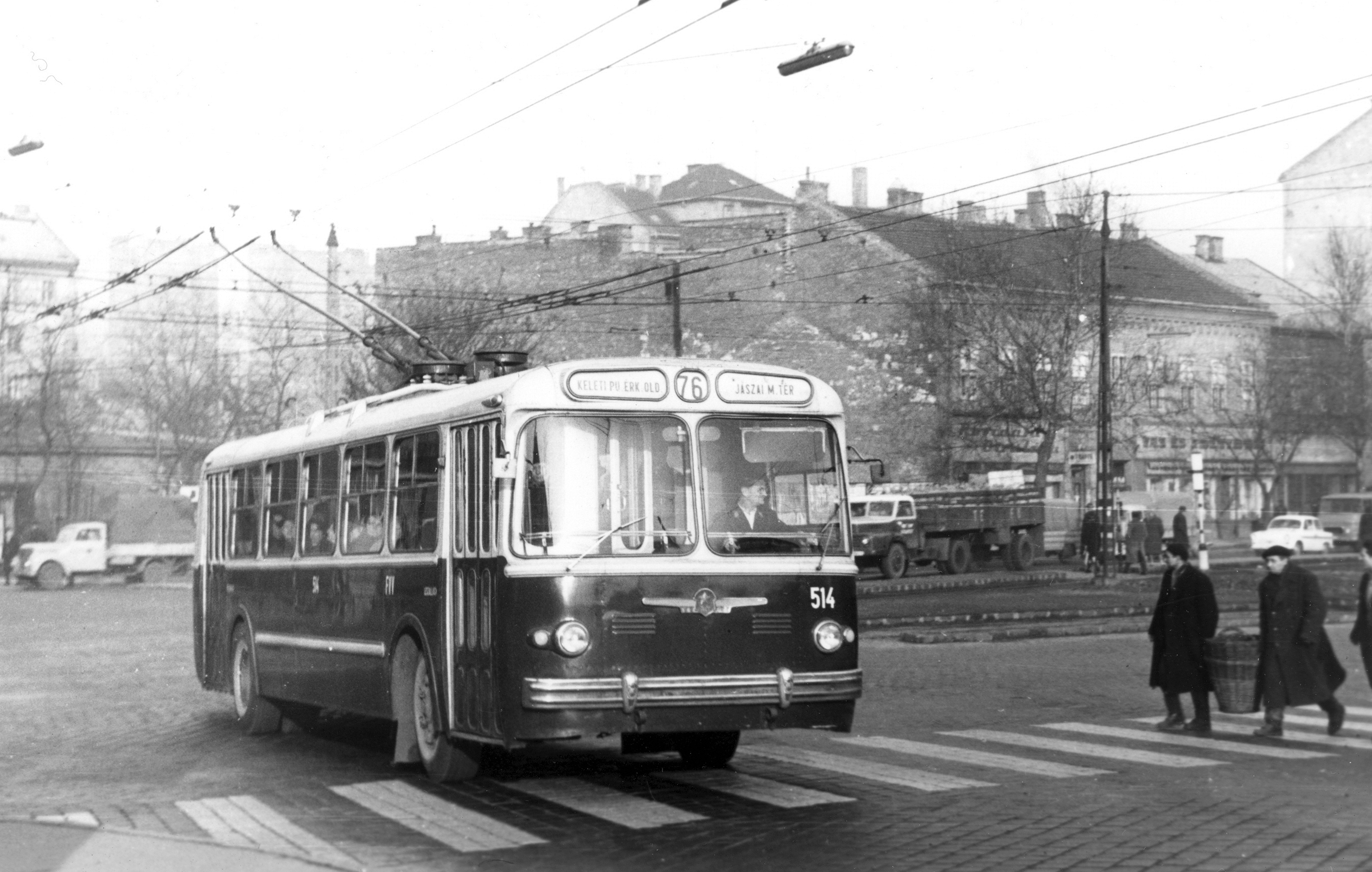 a Csanády utcából a Ferdinánd (Élmunkás) hídra hajt föl a troli. Location: Hungary, Budapest XIII. Tags: trolley bus, Soviet brand, crosswalk, Csepel-brand, Hungarian brand, basket, transport, street view, genre painting, commercial vehicle, Trabant-brand, sign-board, Budapest Title: a Csanády utcából a Ferdinánd (Élmunkás) hídra hajt föl a troli.